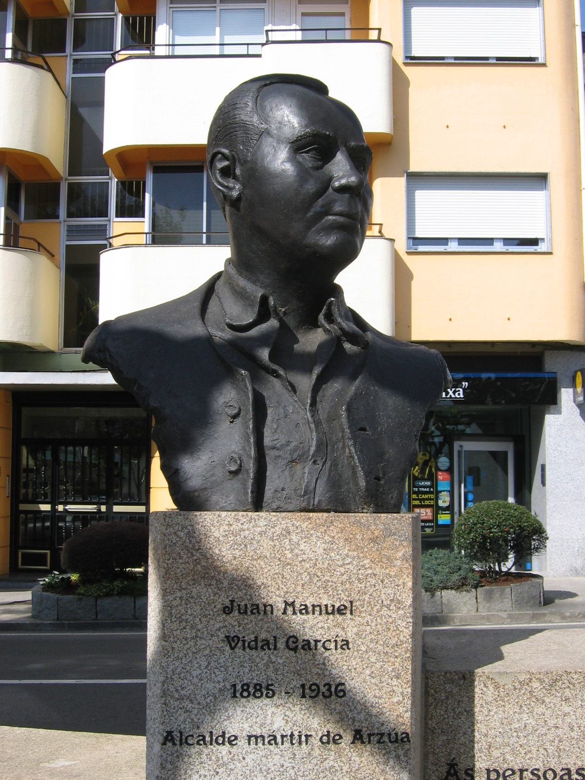 Monumento a Juan Manuel Vidal García, alcalde de Arzúa (A Coruña), fusilado en agosto de 1936.